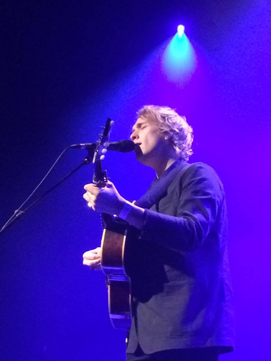 Rhodes (chanteur anglais) à l'Orangerie (Bruxelles), le 6 février 2016